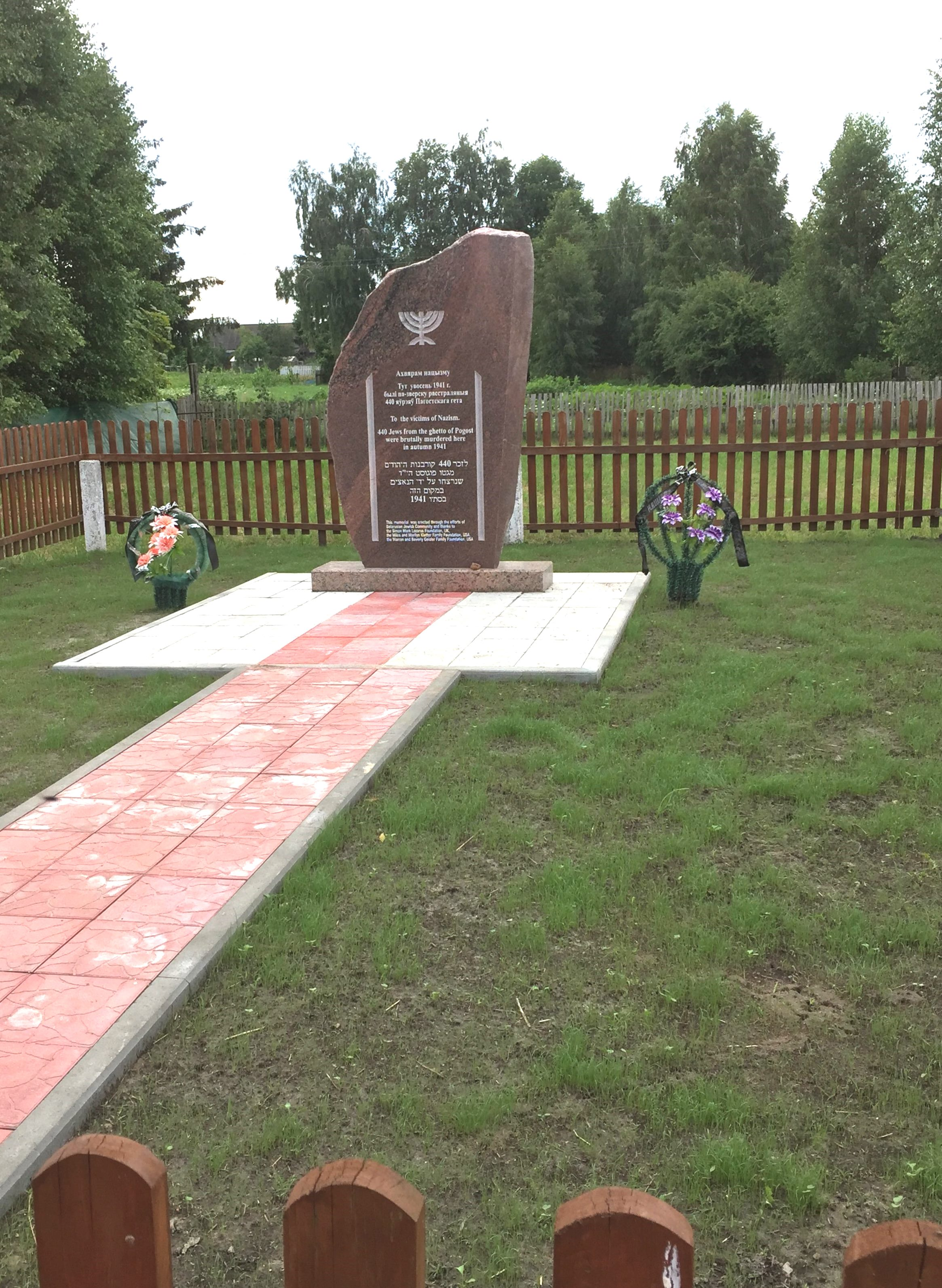 Один из двух новых памятников на братских могилах евреев деревни Погост Солигорского района Беларуси, убитых во время Холокоста. На старом памятнике было указано, что в этой братской могиле покоятся 286 человек, а на новом памятнике, установленном в 2016 году, уже по уточненным данным написано о 400 евреях.